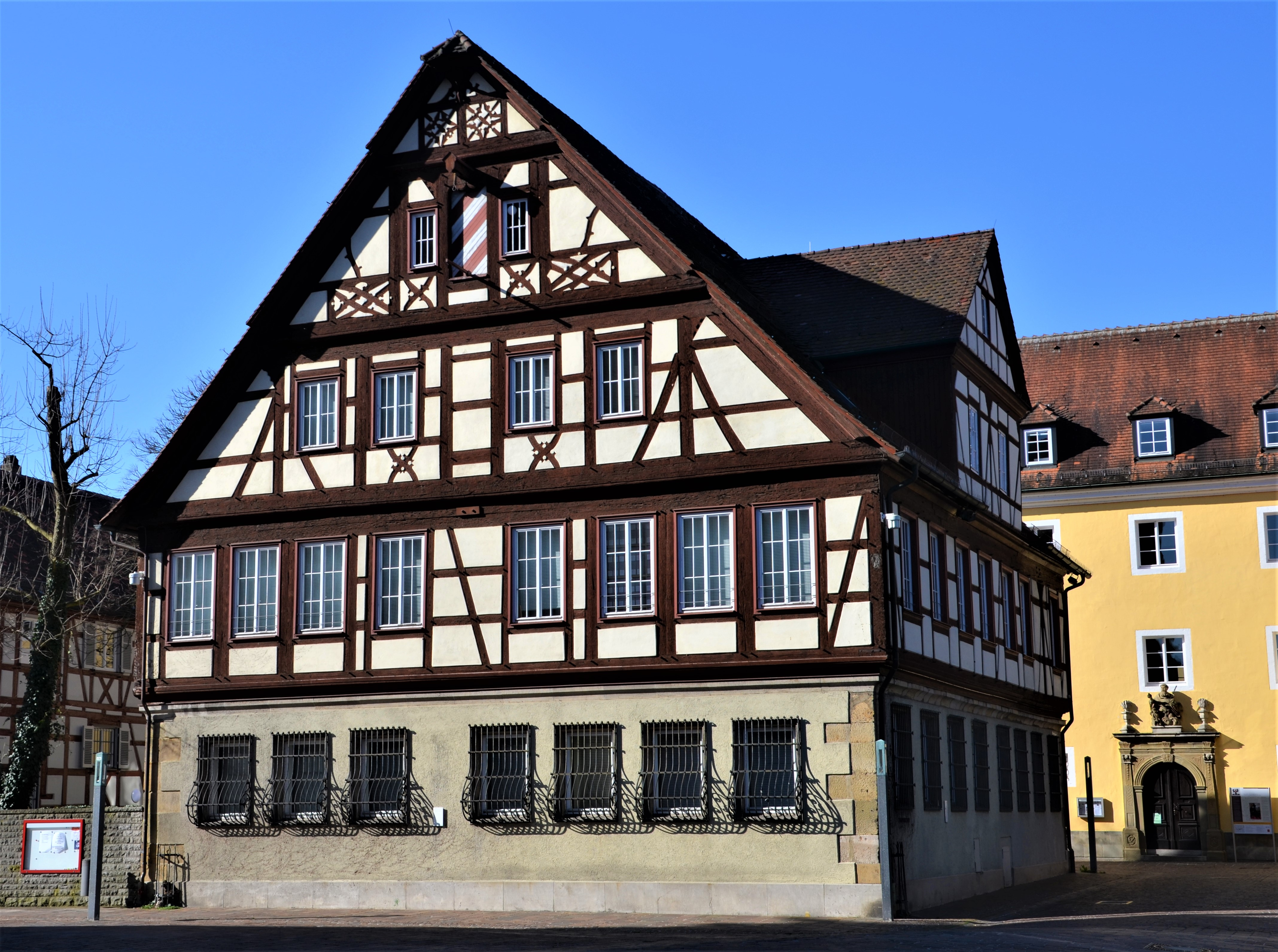 Stadtarchiv in Schwäbisch Gmünd vom nördlichen Münsterplatz aus aufgenommen